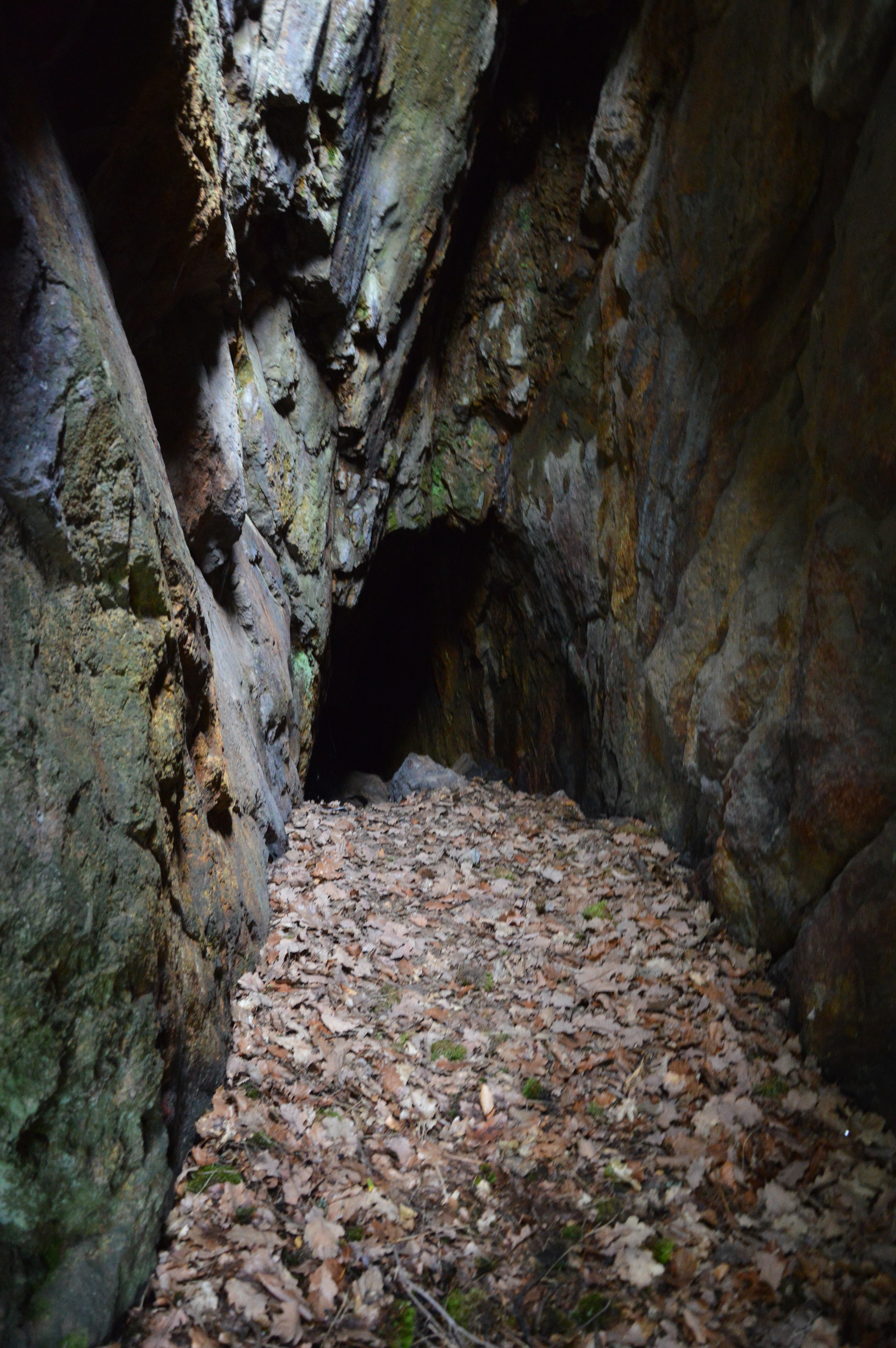 Zinnoberhöhle Blick hinein